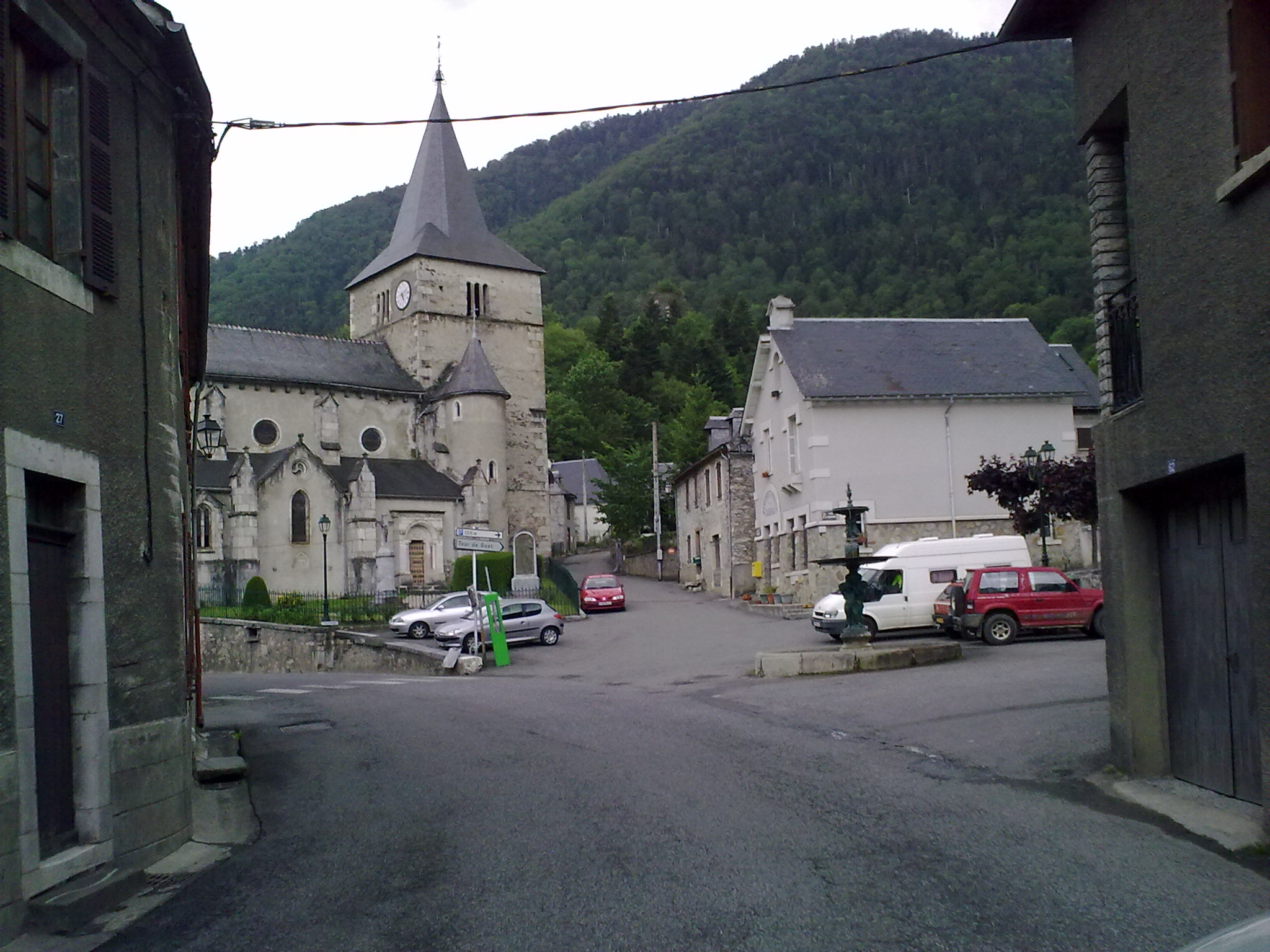 Cadéac